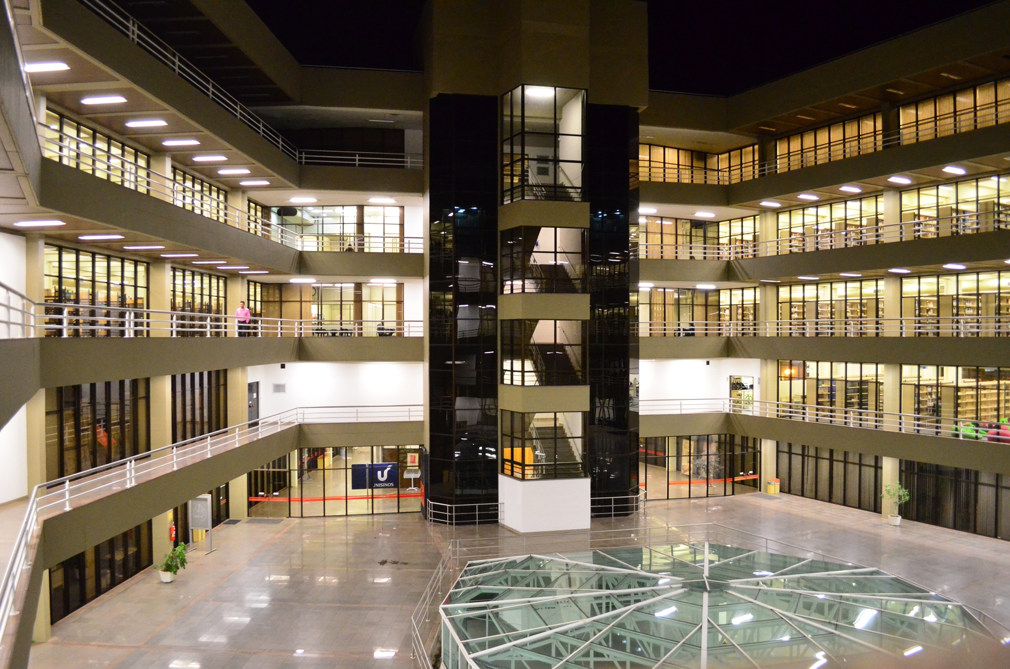 Vista interna do prédio da Biblioteca da Unisinos